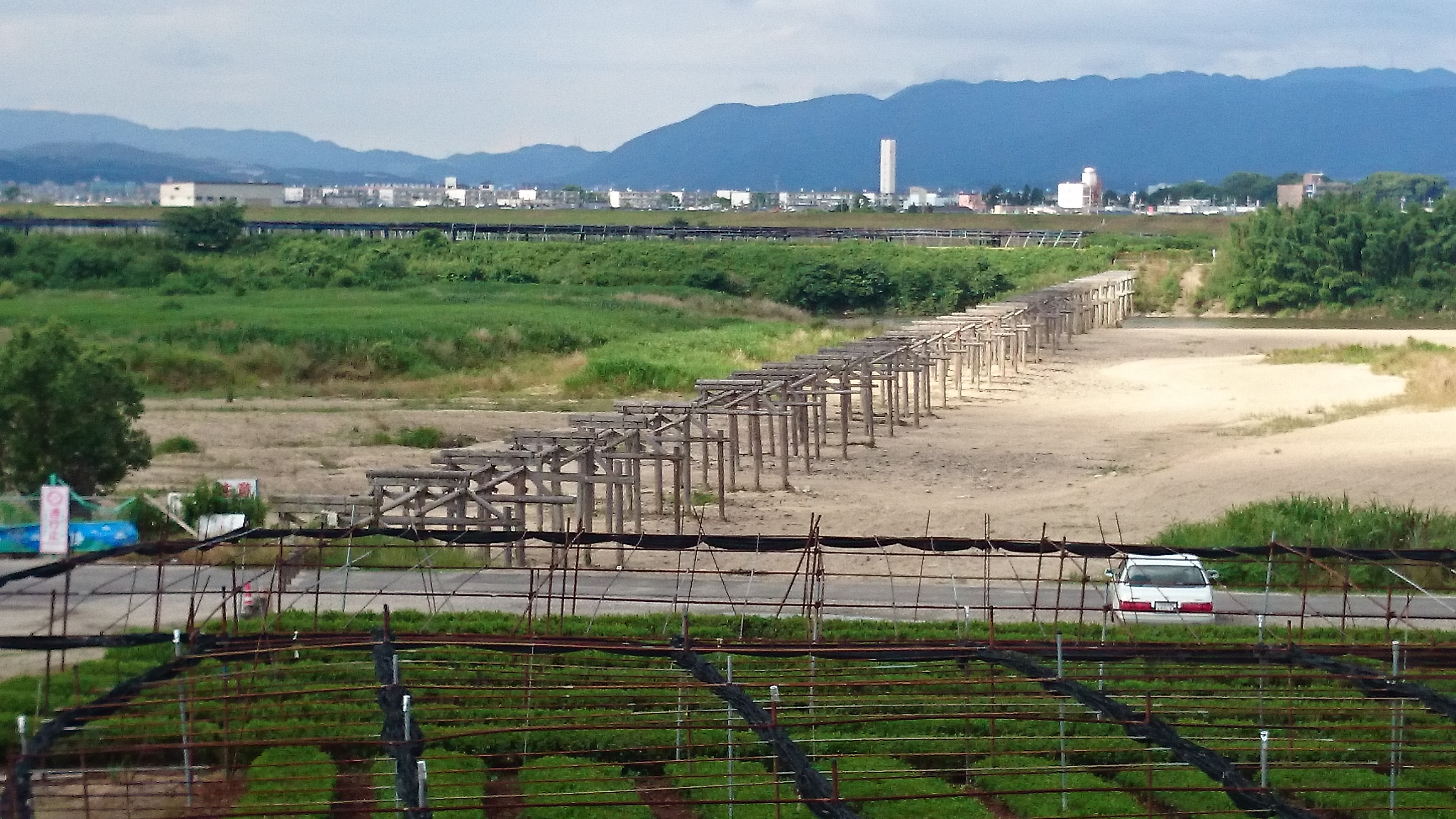 2015年６月21日現在 鏡面撤去後の流れ橋